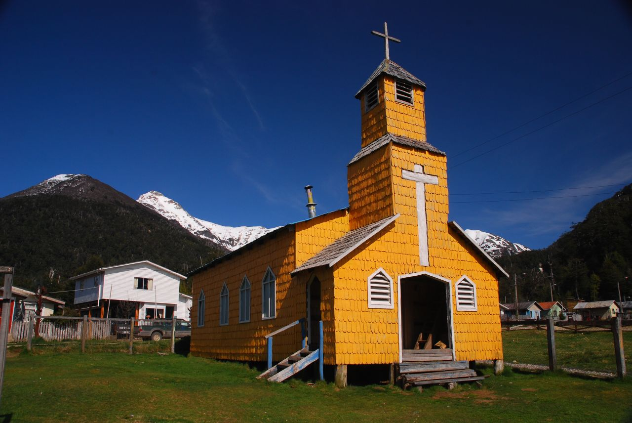 Capilla de Villa Amengual, Región de Aysén, Chile